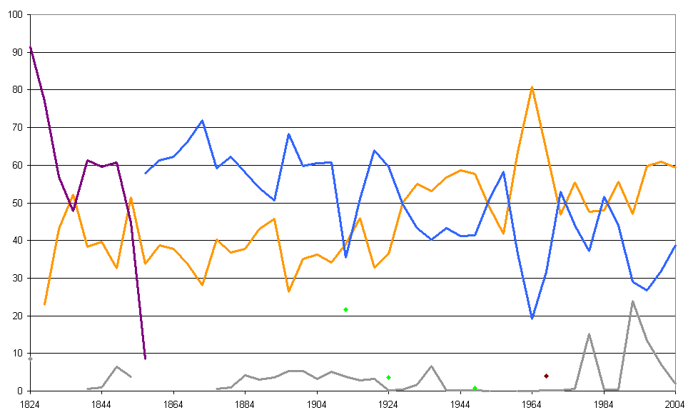 Evolution des partis politiques américains dans l'Etat du Rhode Island aux élections présidentielles depuis 1824 en pourcentage des suffrages exprimés. Légende : voir le fichier "politique USA".